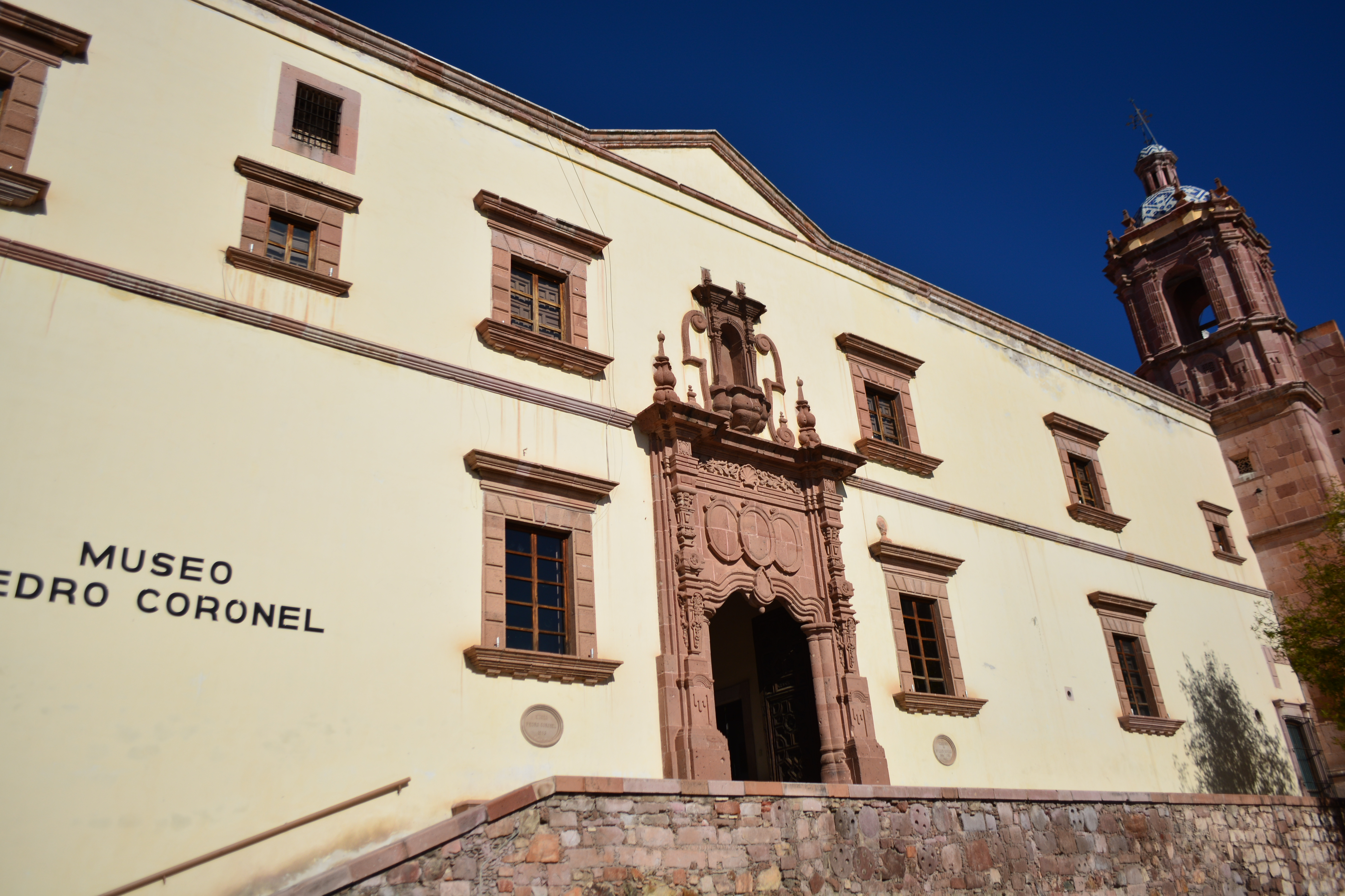 Fachada del Museo Pedro Coronel. Zacatecas, Zacatecas.